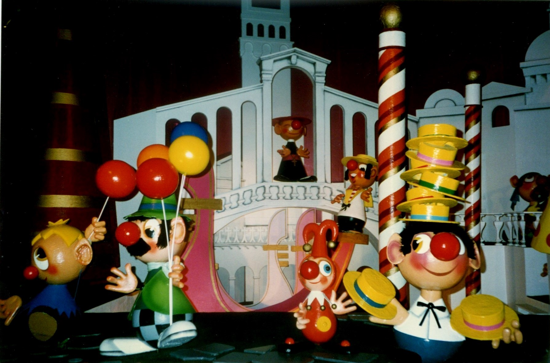 EftelingCarnavalItalie